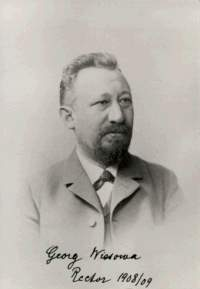 Georg Wissowa (1859-1931), deutscher Altphilologe